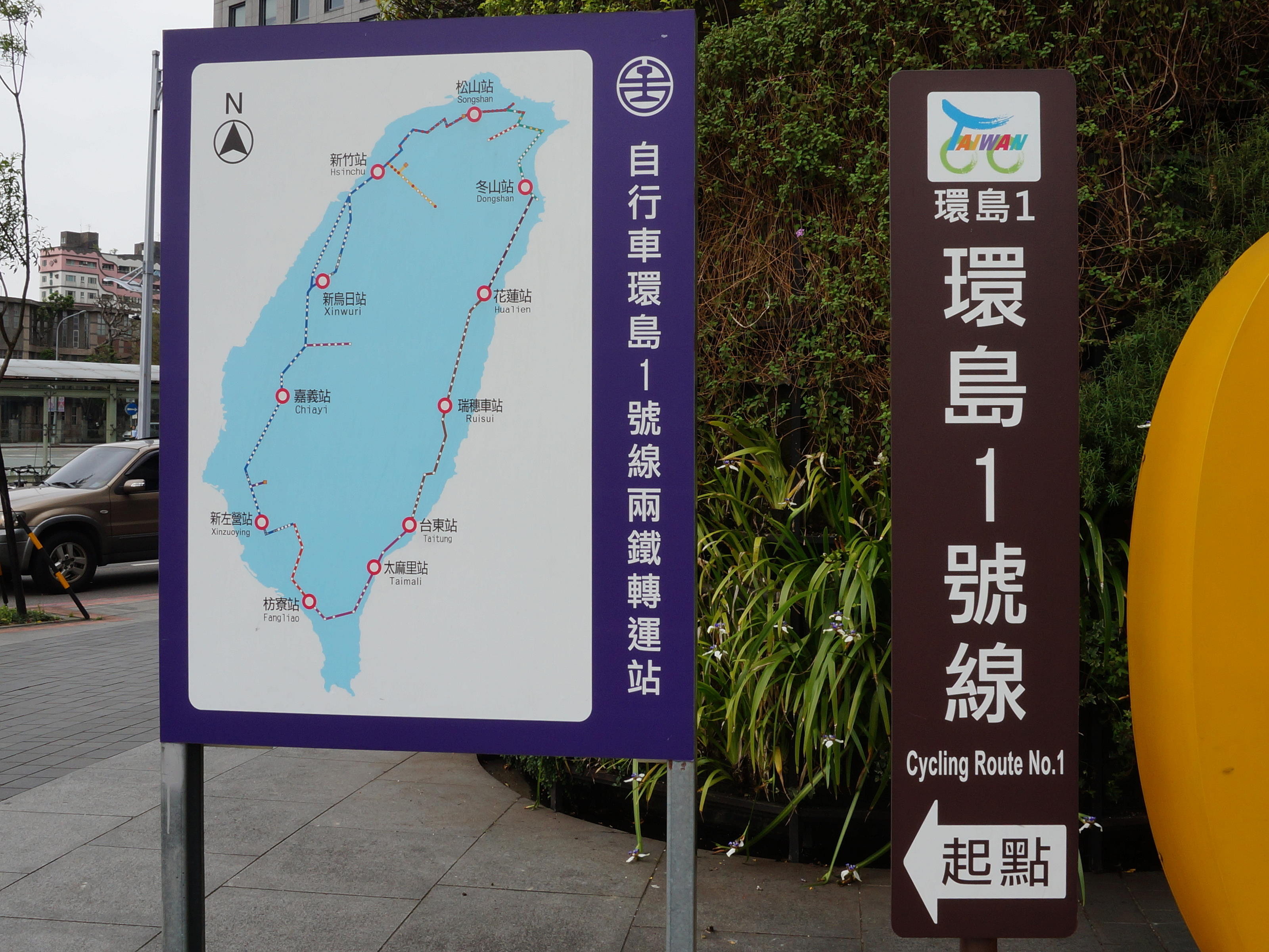 臺灣鐵路管理局松山車站外，環島1號線起點標示牌、環島1號線兩鐵轉運站地圖。